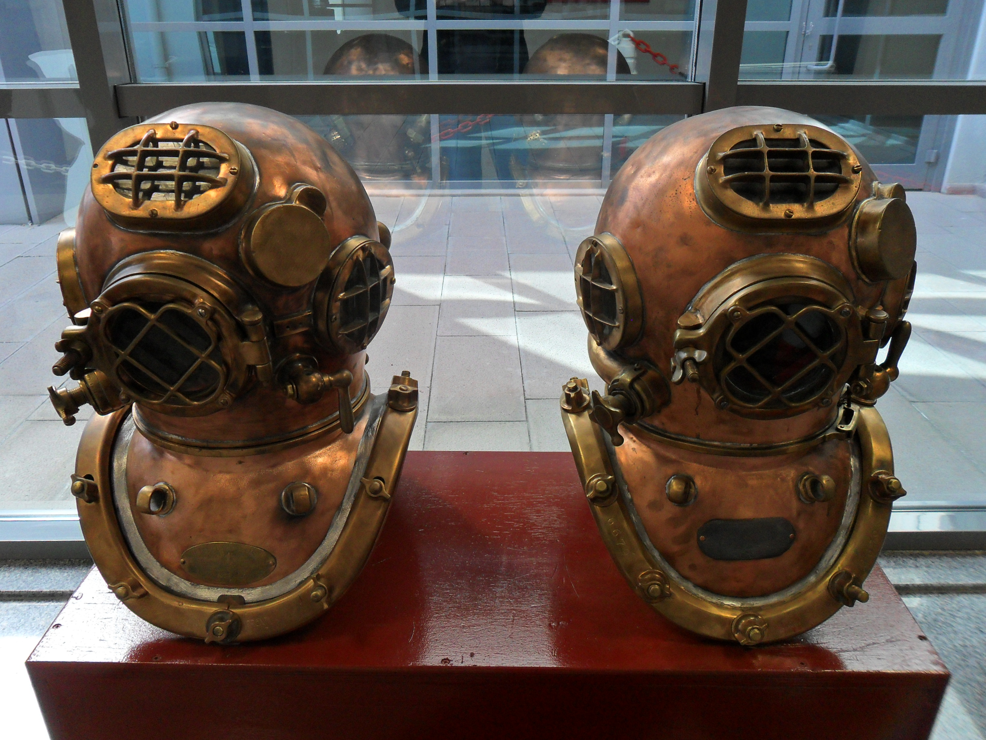 Mersin Deniz Müzesinde sergilenmekte olan derin su dalış başlıkları. Başlığa satıhtan hava hortumuna bağlı pompa yardımı ile oksijen pompalanmaktadır. Başlığın üzerindeki camlar basınca dayanabilmeleri için küçük boyutta üretilmiş ancak dalgıcın görüş alanını artırabilmek adına çok sayıda açılmıştır. Başlık su geçirmeye yapısı ile dalgıcın başını kuru tutarken sert dış kabuğu ise dışarıdan gelebilecek darbelere karşı koruma sağlar.